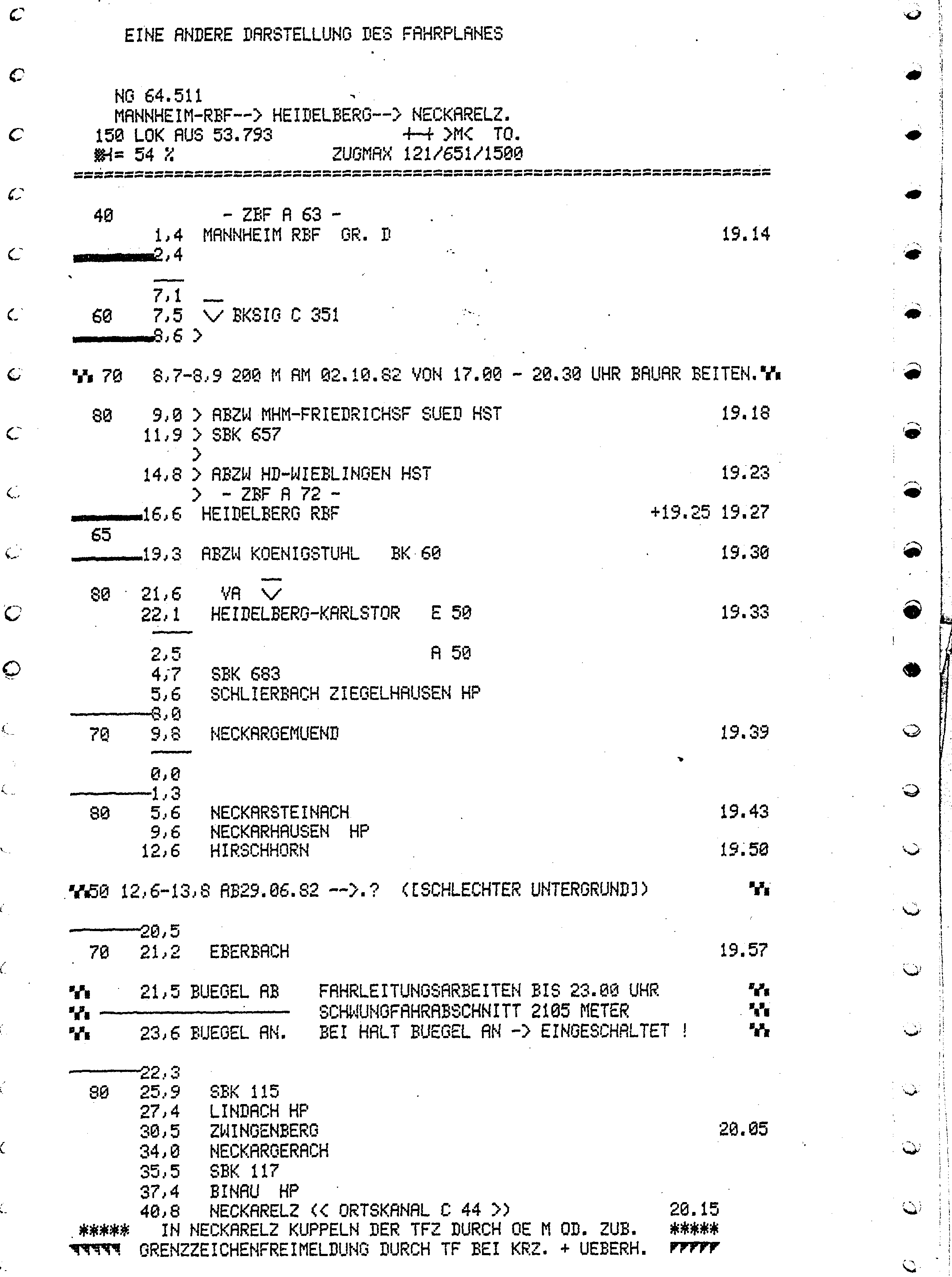 1. Ausdruck eines EBula- Fahrplanmusters